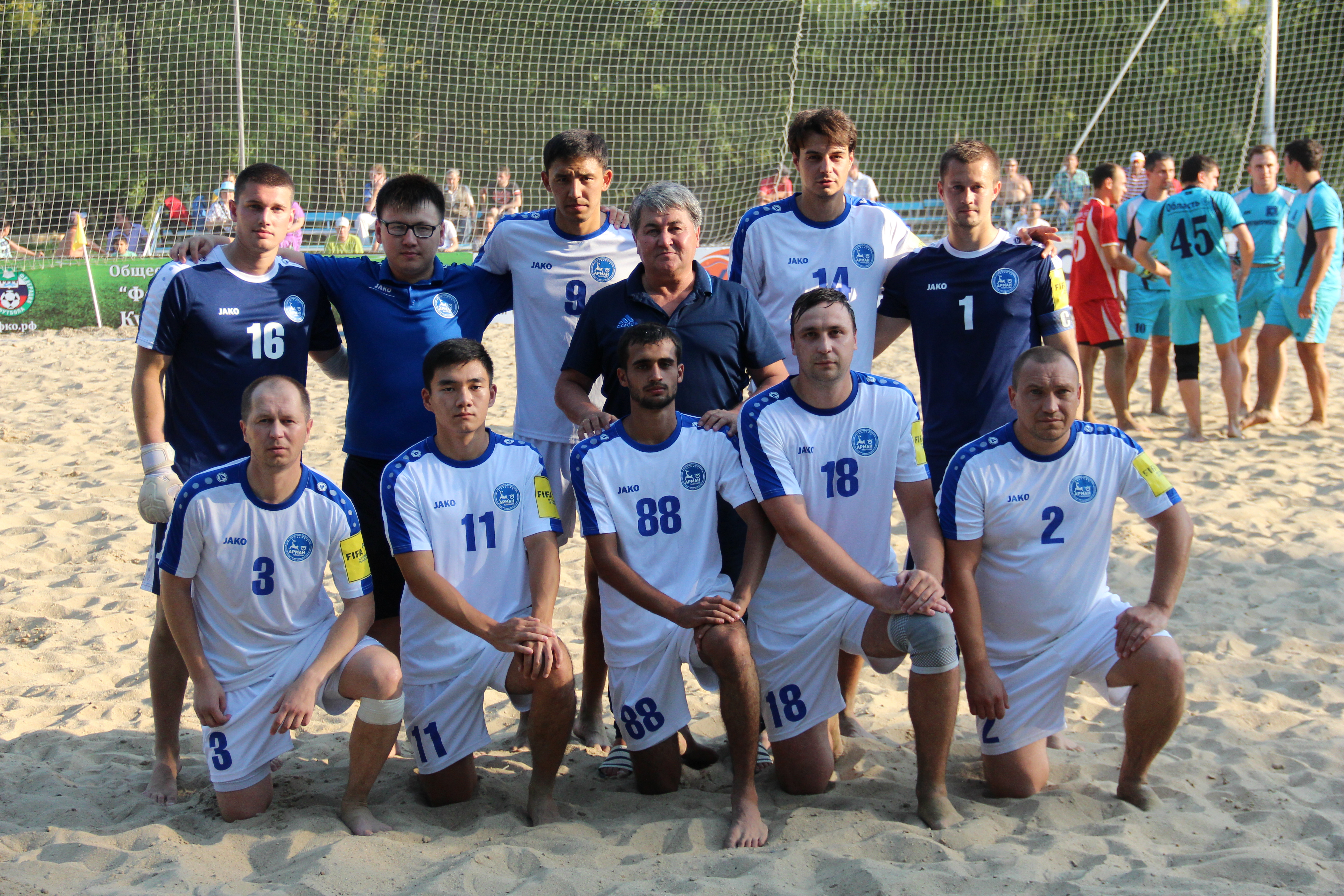 Состав команды «Арман» на Суперфинале Евразийской лиги пляжного футбола в Кургане.